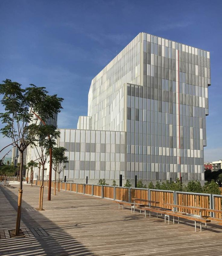 EEBE Edifici A CampusDiagonal Besòs